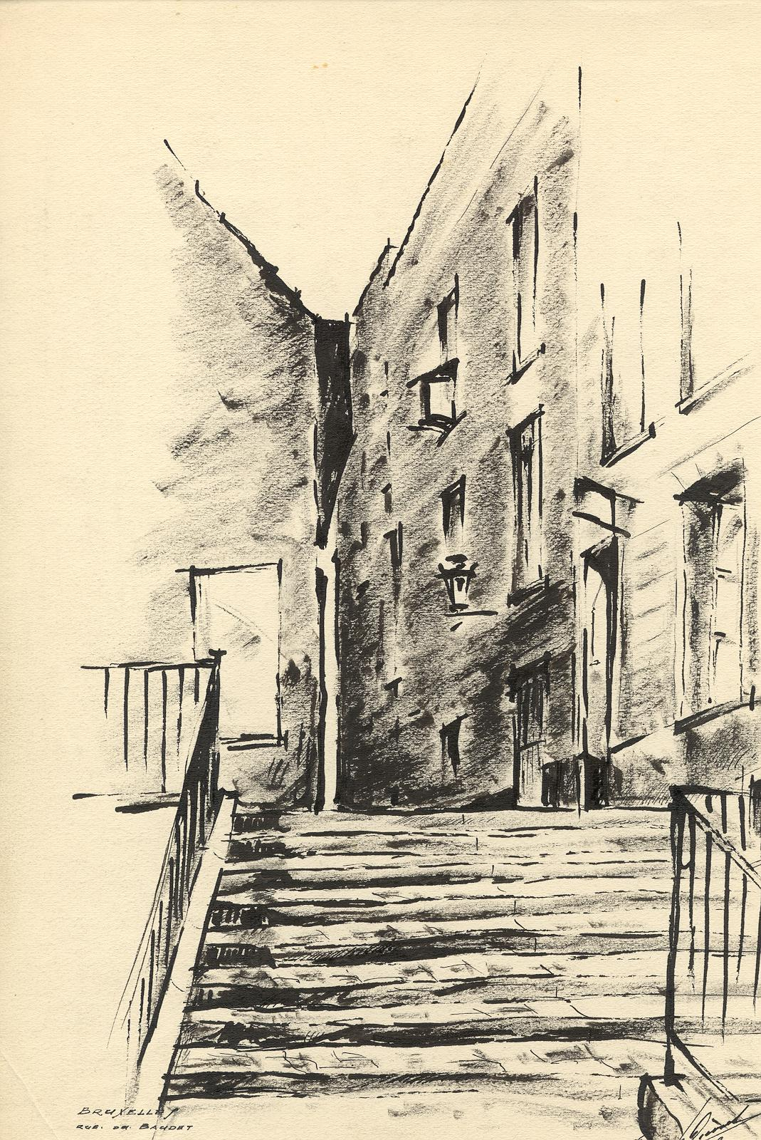 Bruxelles, rue du Baudet, dessin à l'encre de chine par Léon van Dievoet, architecte, le 15 juillet 1939